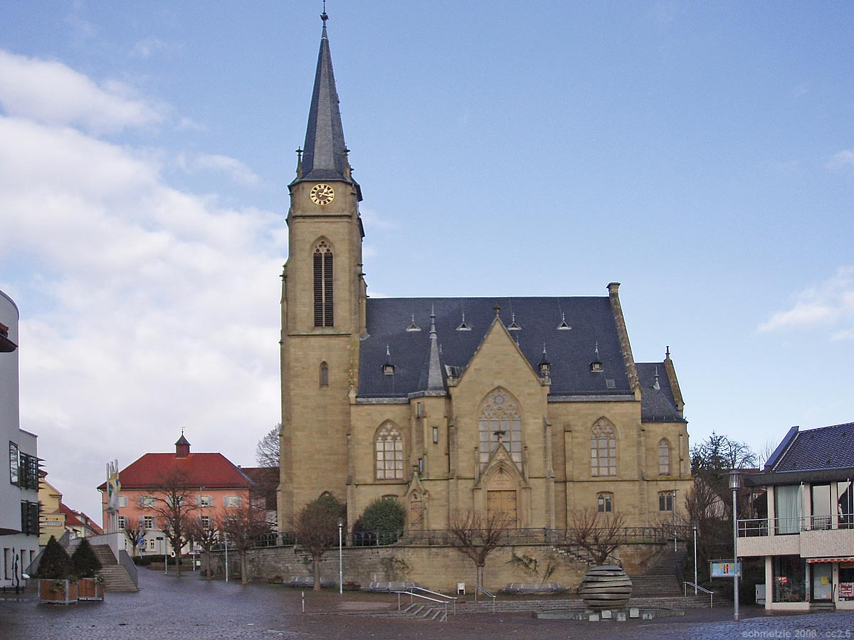 Evangelische Stadtkirche in Bad Rappenau, erbaut 1887/88